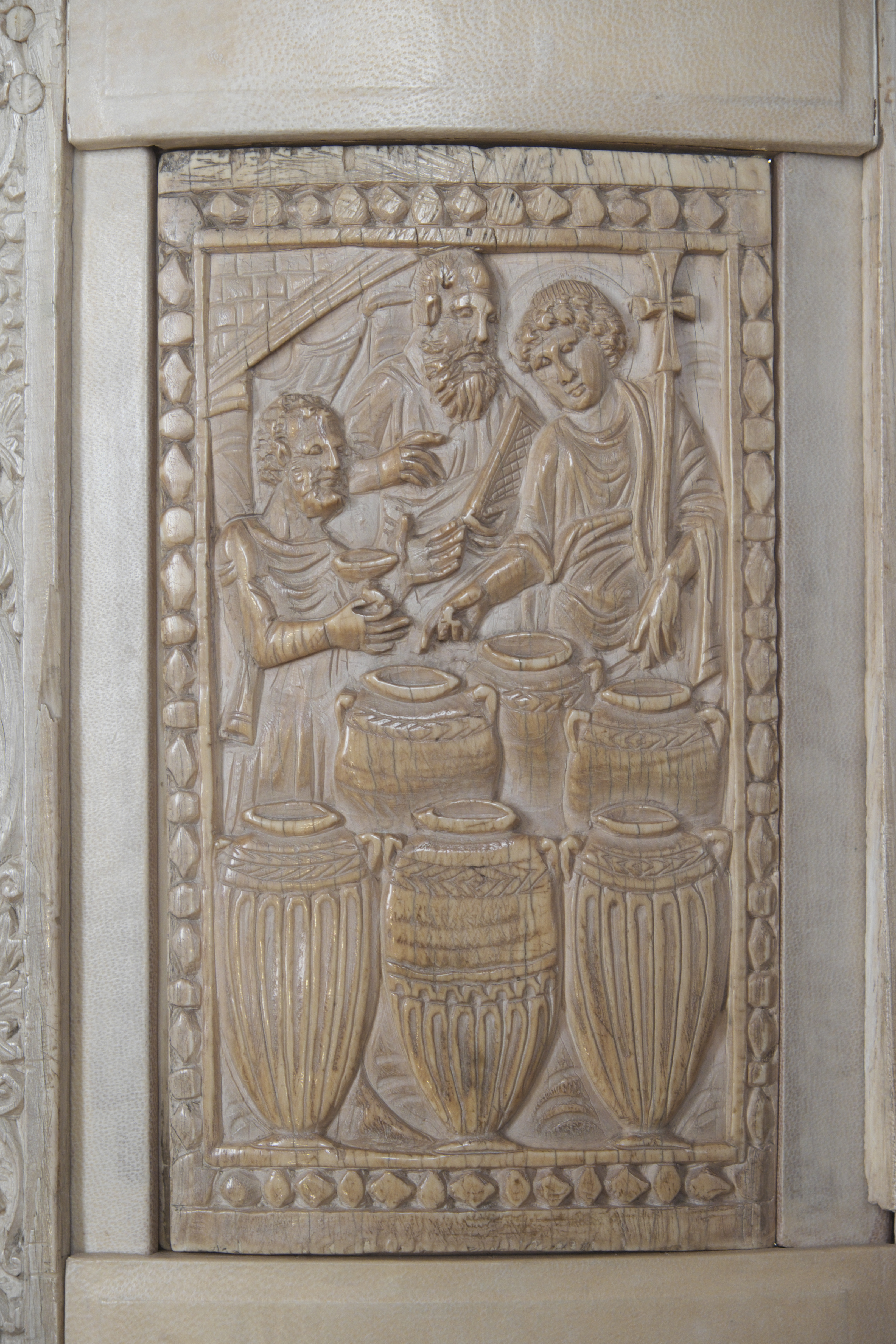 Maximianskathedra im Erzbischöflichen Museum in Ravenna (Emilia-Romagna/Italien), Darstellung: Verwandlung von Wasser in Wein bei der Hochzeit zu Kana